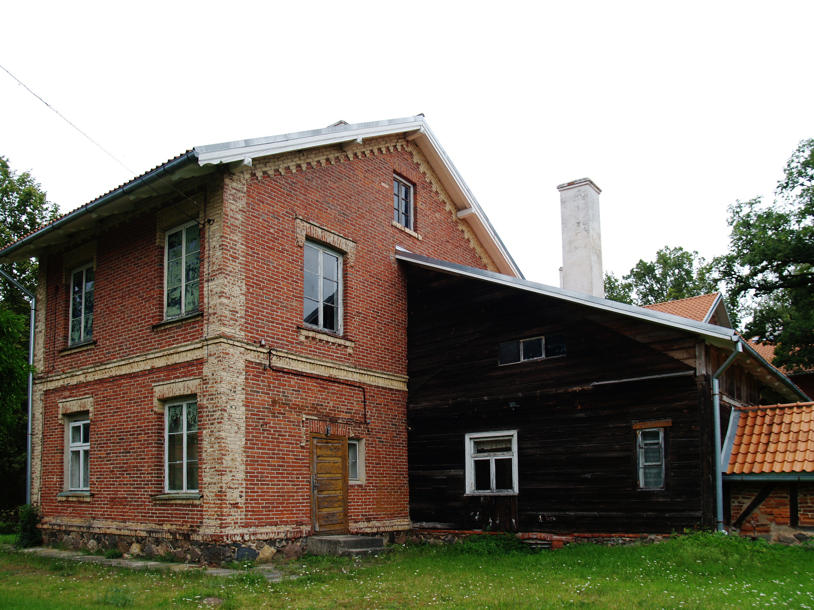 Laane mõis ehk Lāņu muiža.